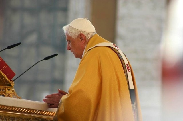 Papst Benedikt XVI. an der Heiligsprechungsfeier für Maria Bernarda Bütler in Rom